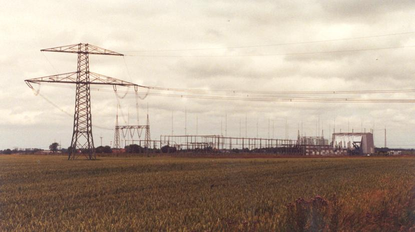 Umspannwerk und Stromrichterstation Bentwisch der HGÜ Kontek, aufgenommen im Juli 2000